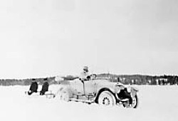 Bergendals godsägare Ragnar Liljenroth var mycket bilintresserad och plogade vintertid en körväg över isen från Bergendal till Ulriksdals slott.